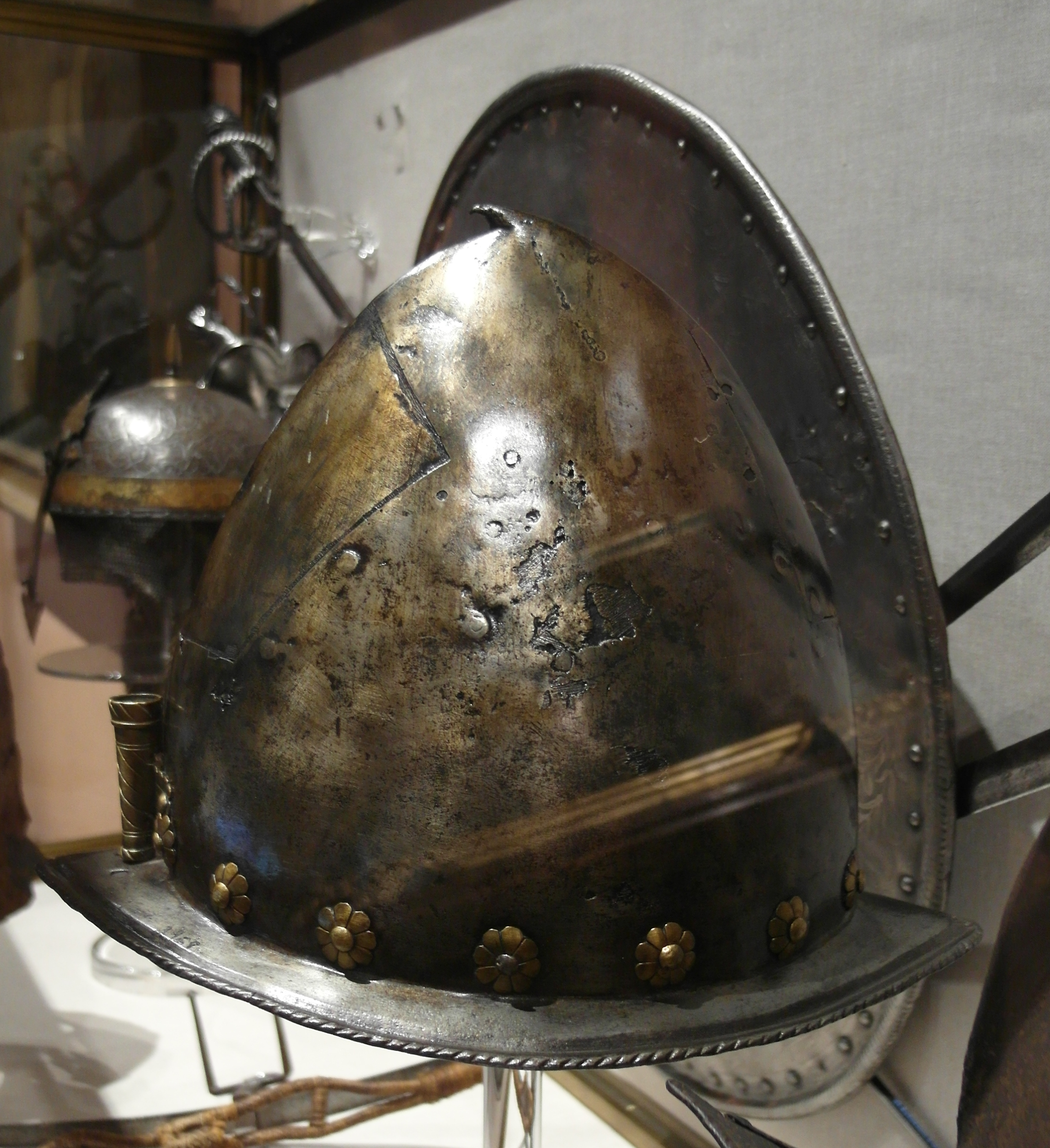 Capacete español, hacia 1550. Museo Naval de Madrid.